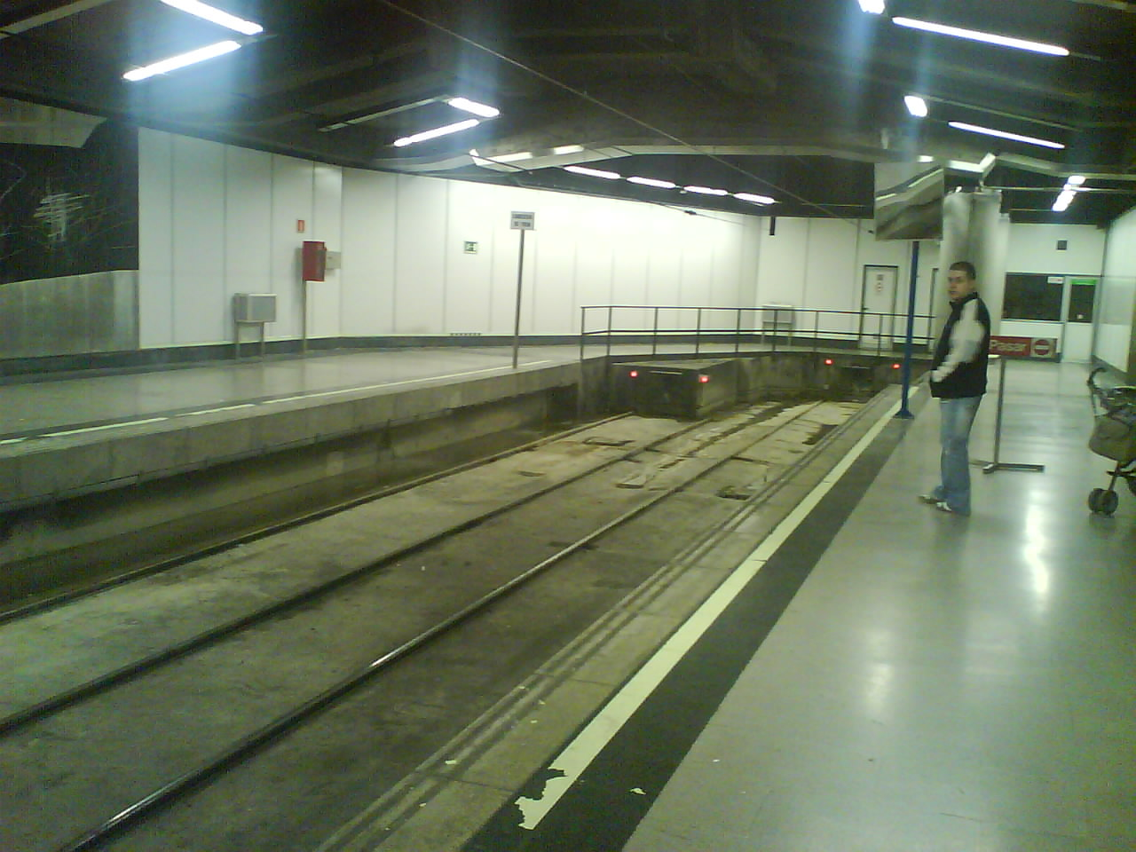 Parada del Ramal en Príncipe Pío. Sólo una de las dos vías es utilizable, la otra es para guardar uno de los dos trenes.